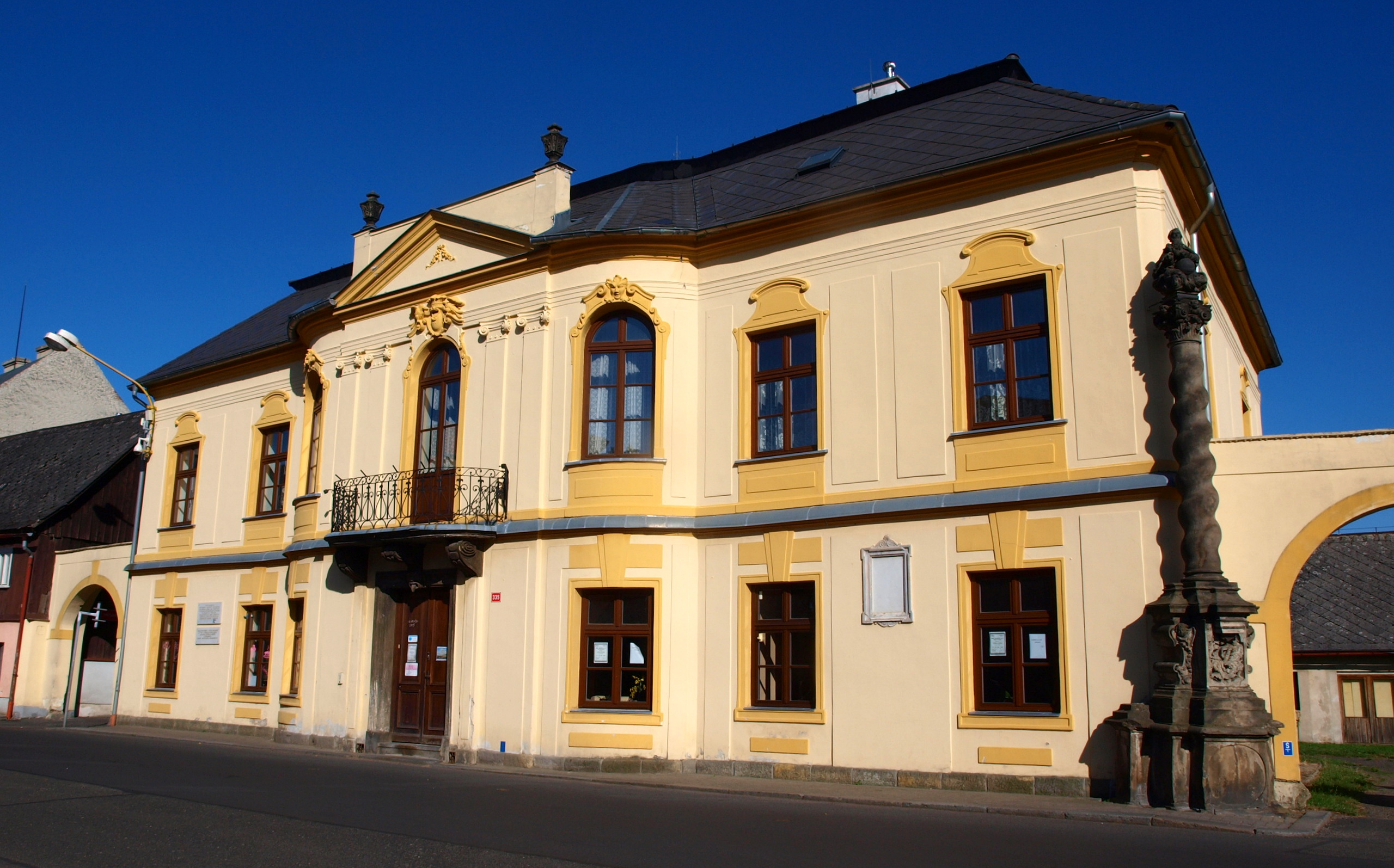 Lovecký zámeček Pachtů z Rájova v Jablonném v Podještědí